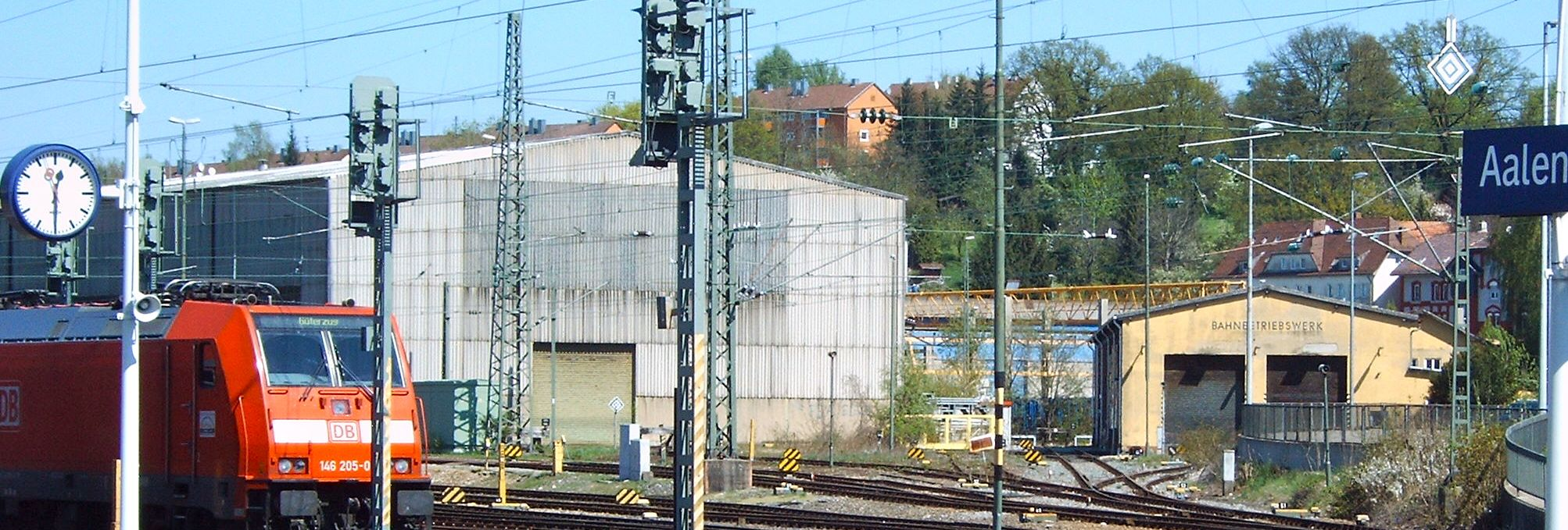 Bahnbetriebswerk am Bahnhof Aalen